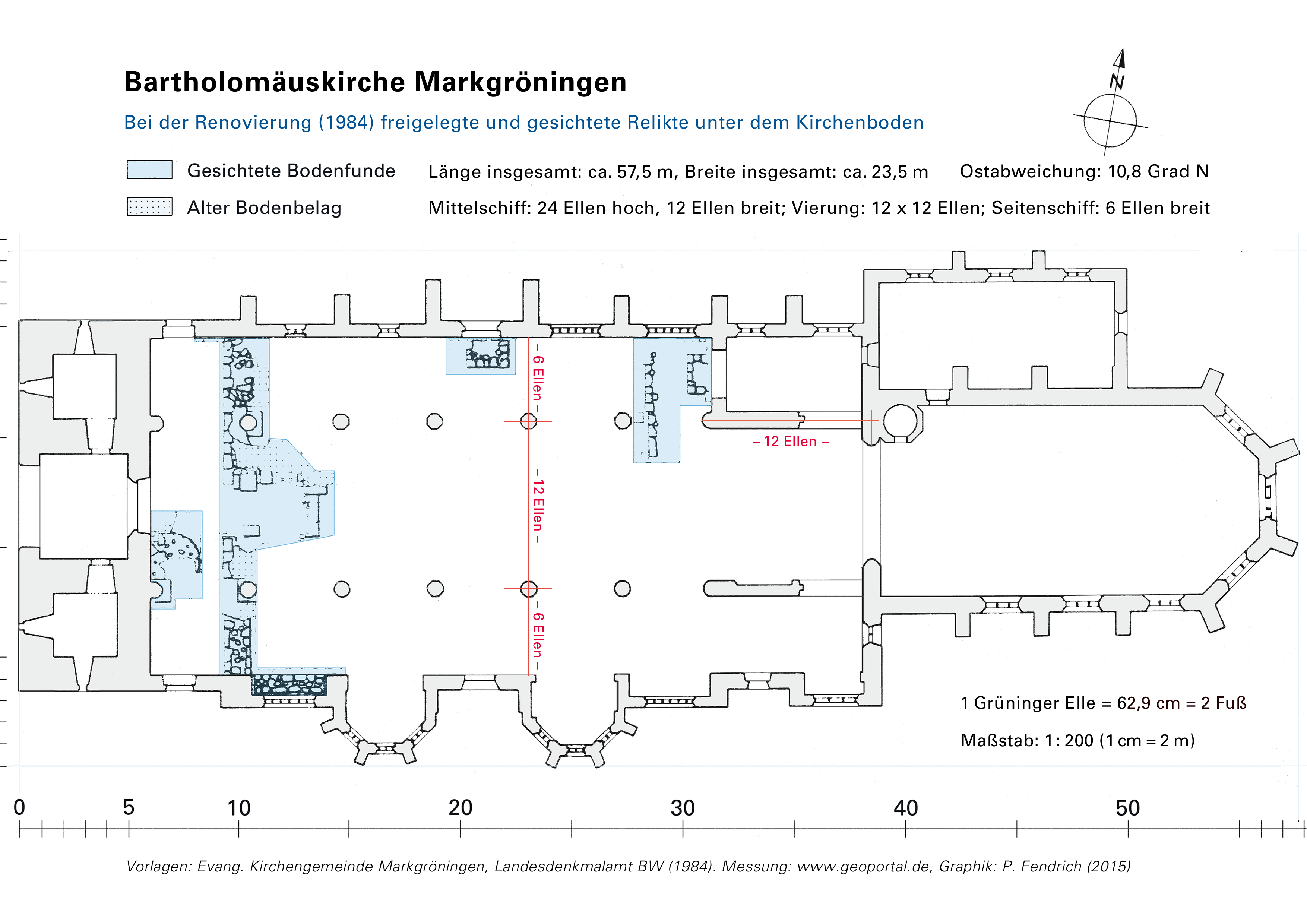 Grundriss der Bartholomäuskirche in Markgröningen mit archäologischen Befundstellen von 1984. Mehr konnte damals nicht untersucht werden. Maße gerundet.